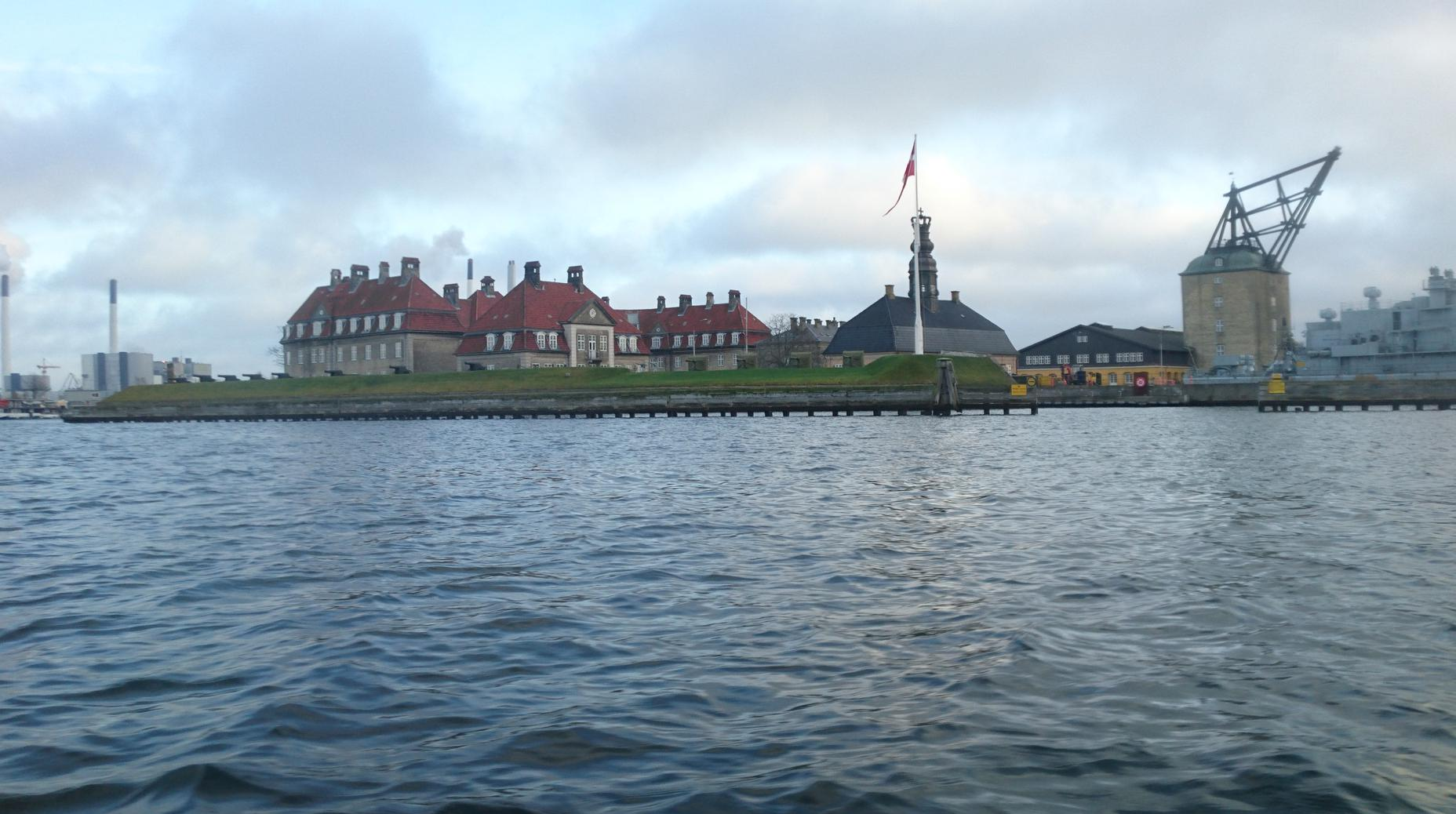 Søværnets Kaserne på Holmen set fra søsiden